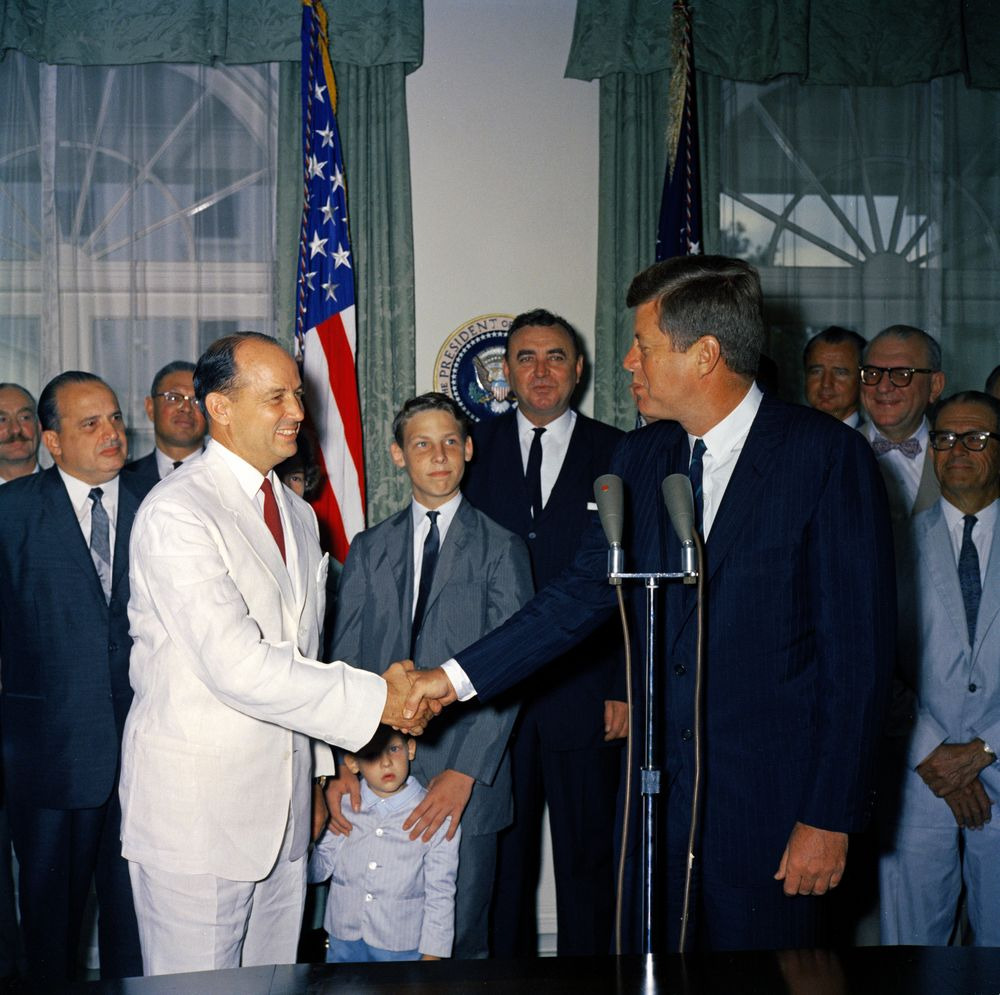 Swearing-in ceremonies for deLesseps S. Morrison as United States Ambassador to the Organization of American States (OAS) and Robert F. Woodward as Assistant Secretary of State for Inter-American Affairs. deLesseps Morrison, shaking hands with President John F. Kennedy; John Randolph "Randy" Morrison (between deLesseps Morrison and President Kennedy); Florida Senator George Smathers (back right, between President Kennedy and a man wearing glasses); others unidentified. Cabinet Room, White House, Washington, D.C.